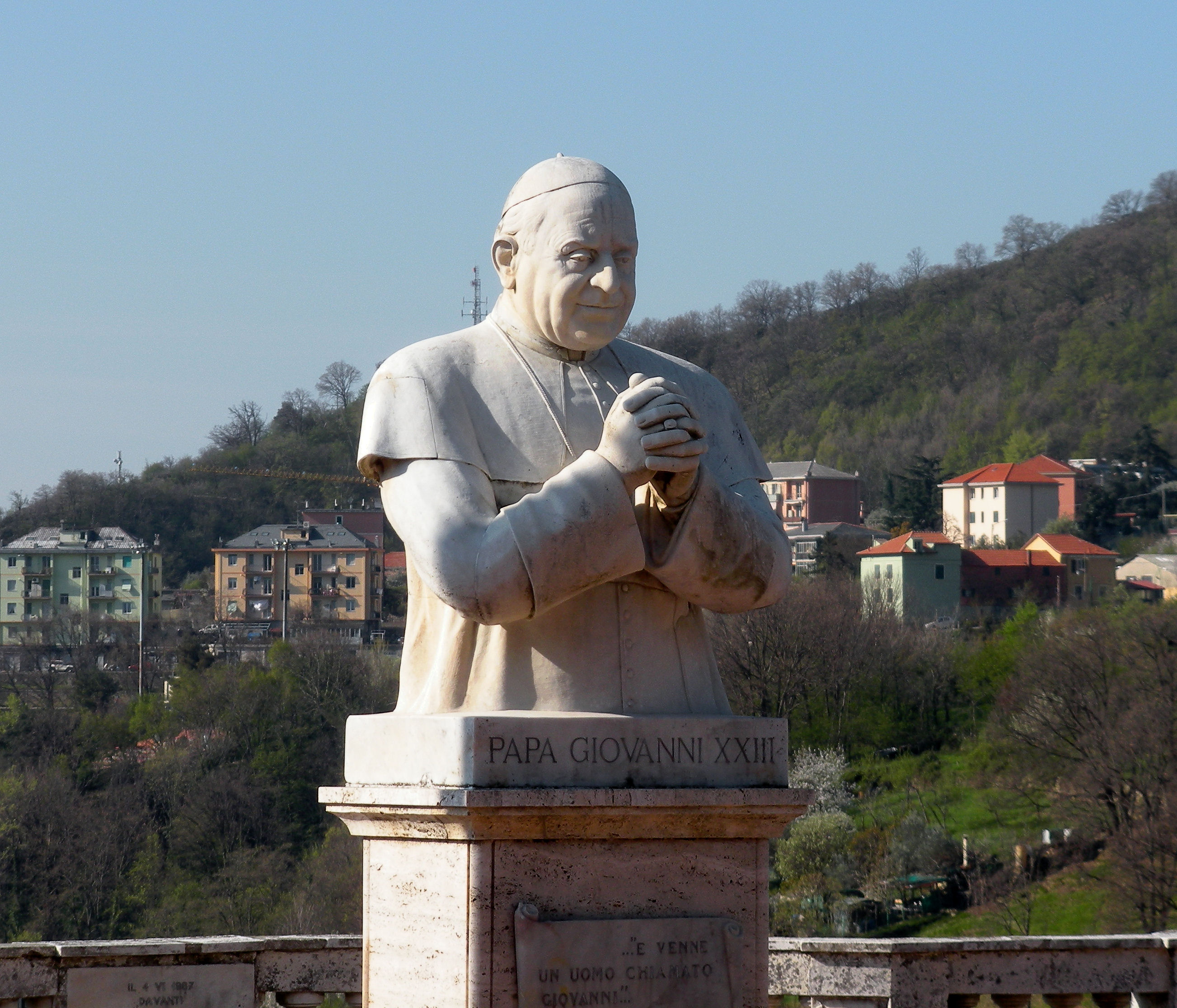 Monumento a papa Giovanni XXIII (Località San Giacomo, Molassana, quartiere di Genova)